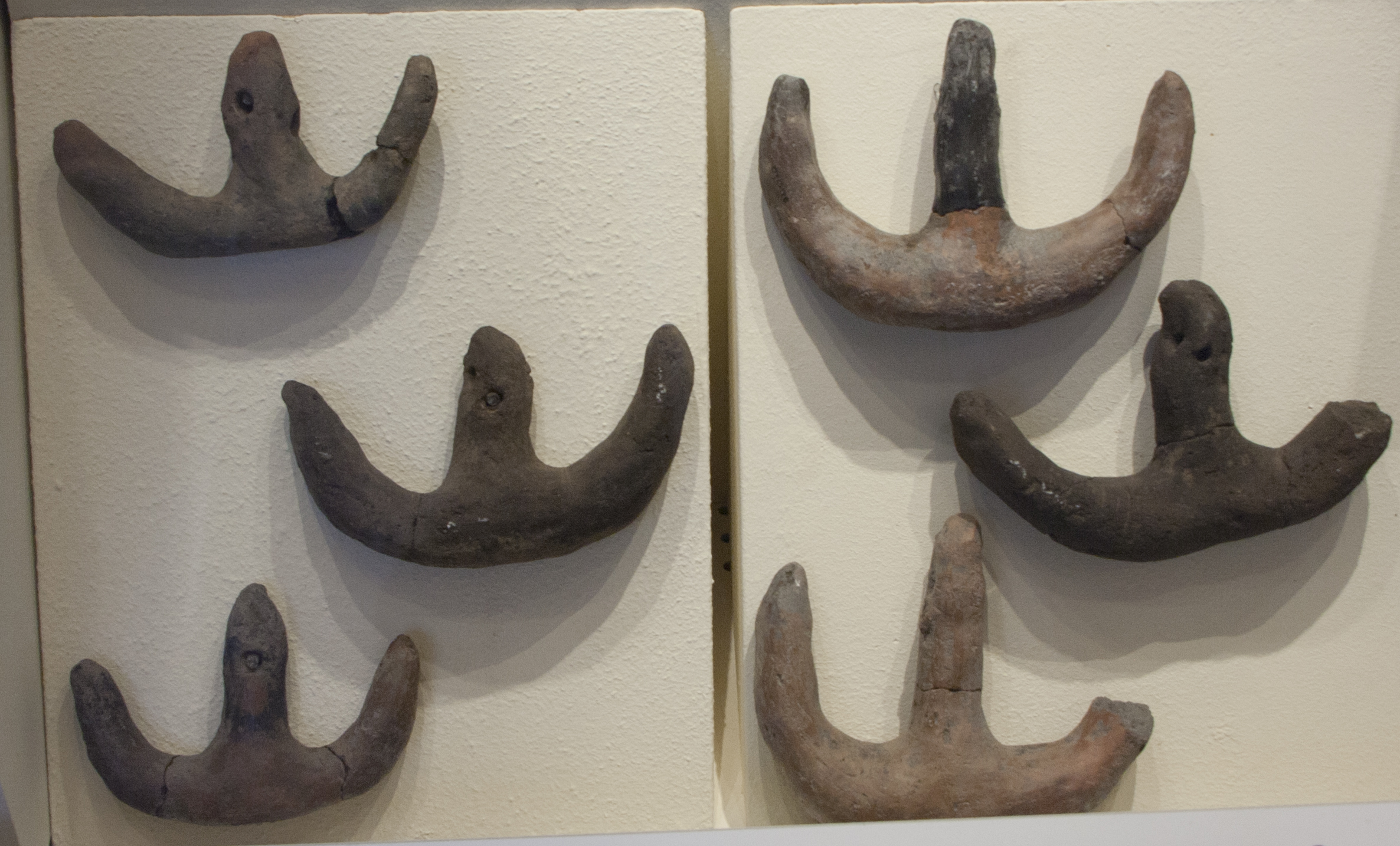 Età del bronzo medio 3 Cultura di Milazzese 1500-1300 a.C. Filicudi, montagnola di capo Graziano